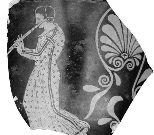 Fragment vázy, Nicholsonovo múzeum v Sydney.